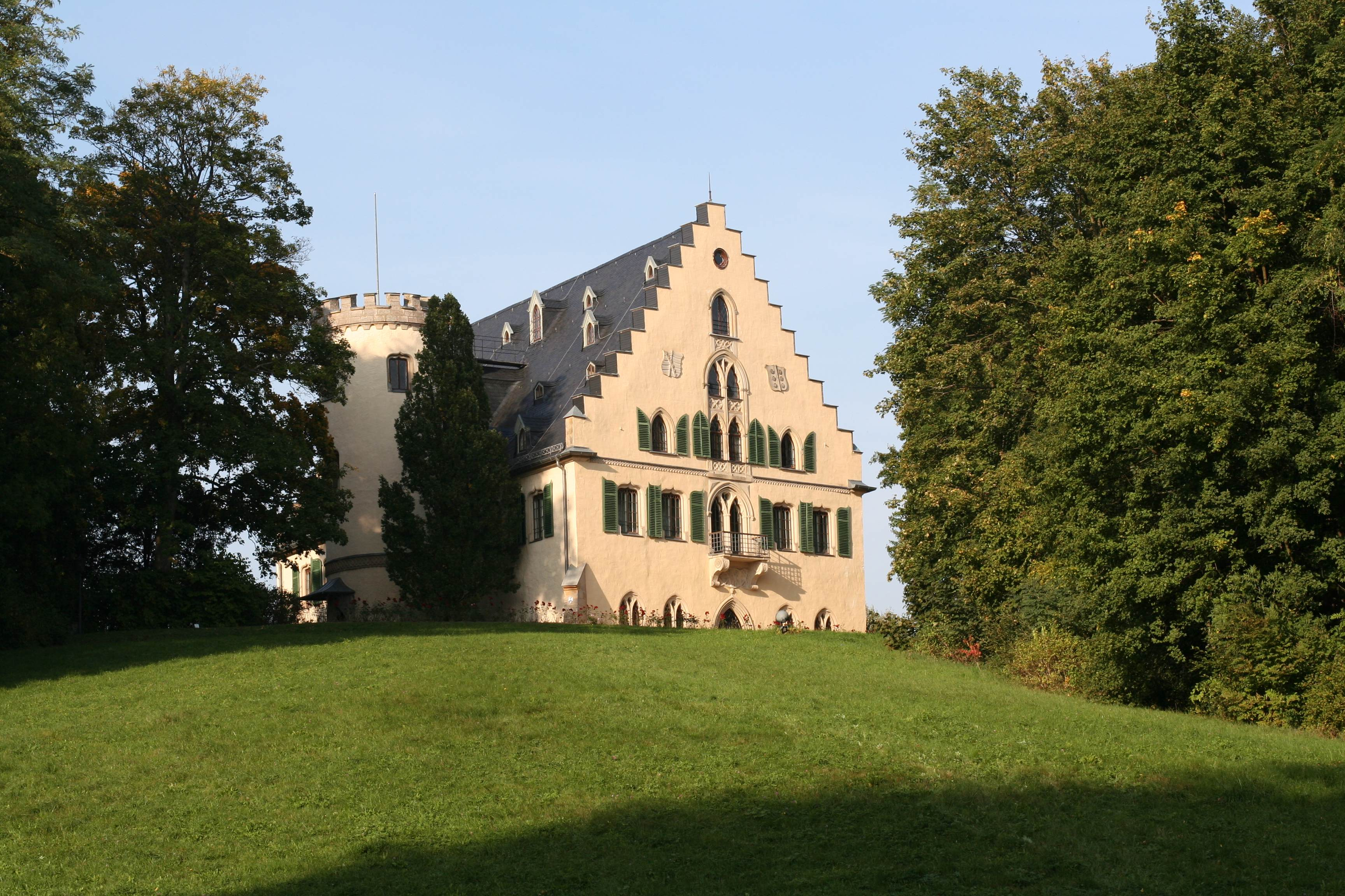 Schloss RosenauSchloss Rosenau bei Rödental im Landkreis Coburg